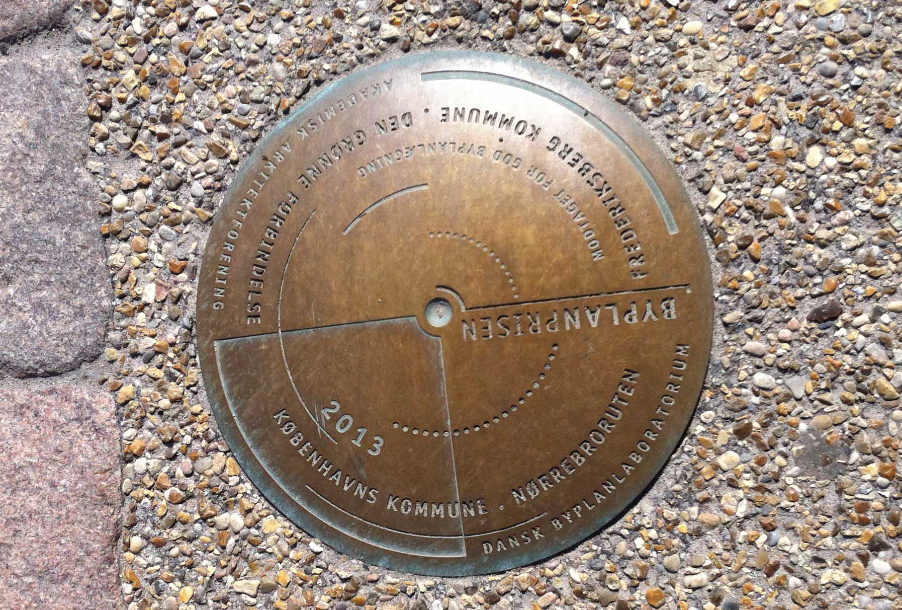 På Åbuen markeres på grænsen mellem Frederiksberg Kommune og Københavns Kommune, at de i 2013 fik byplanprisen for hhv. Den Grønne Forbindelse og Nørrebroruten